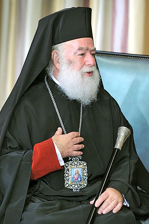 Патриарх Александрийский Феодор II на встрече с Владимиром Путиным